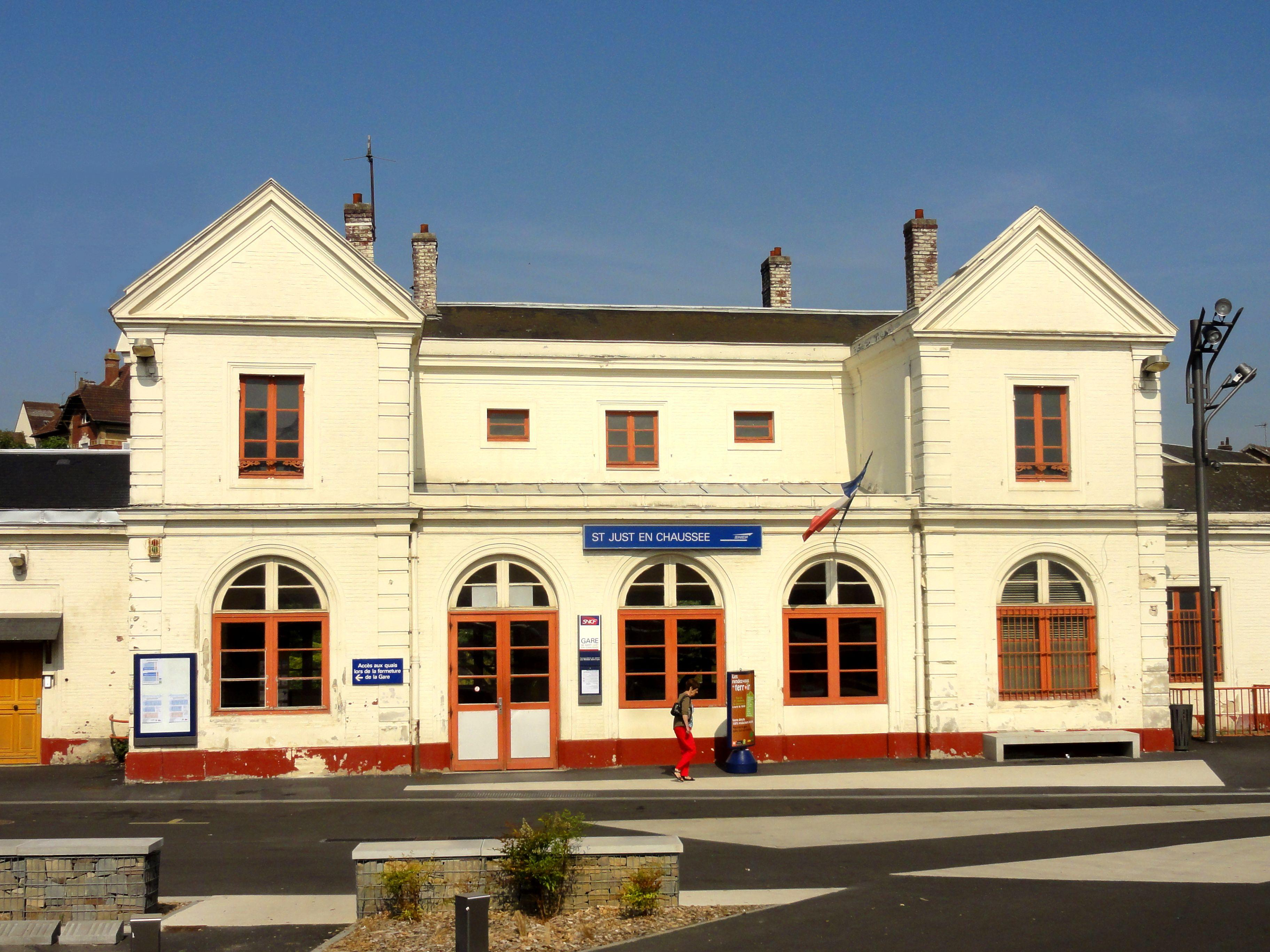 Bâtiment-voyageurs, côté ville.